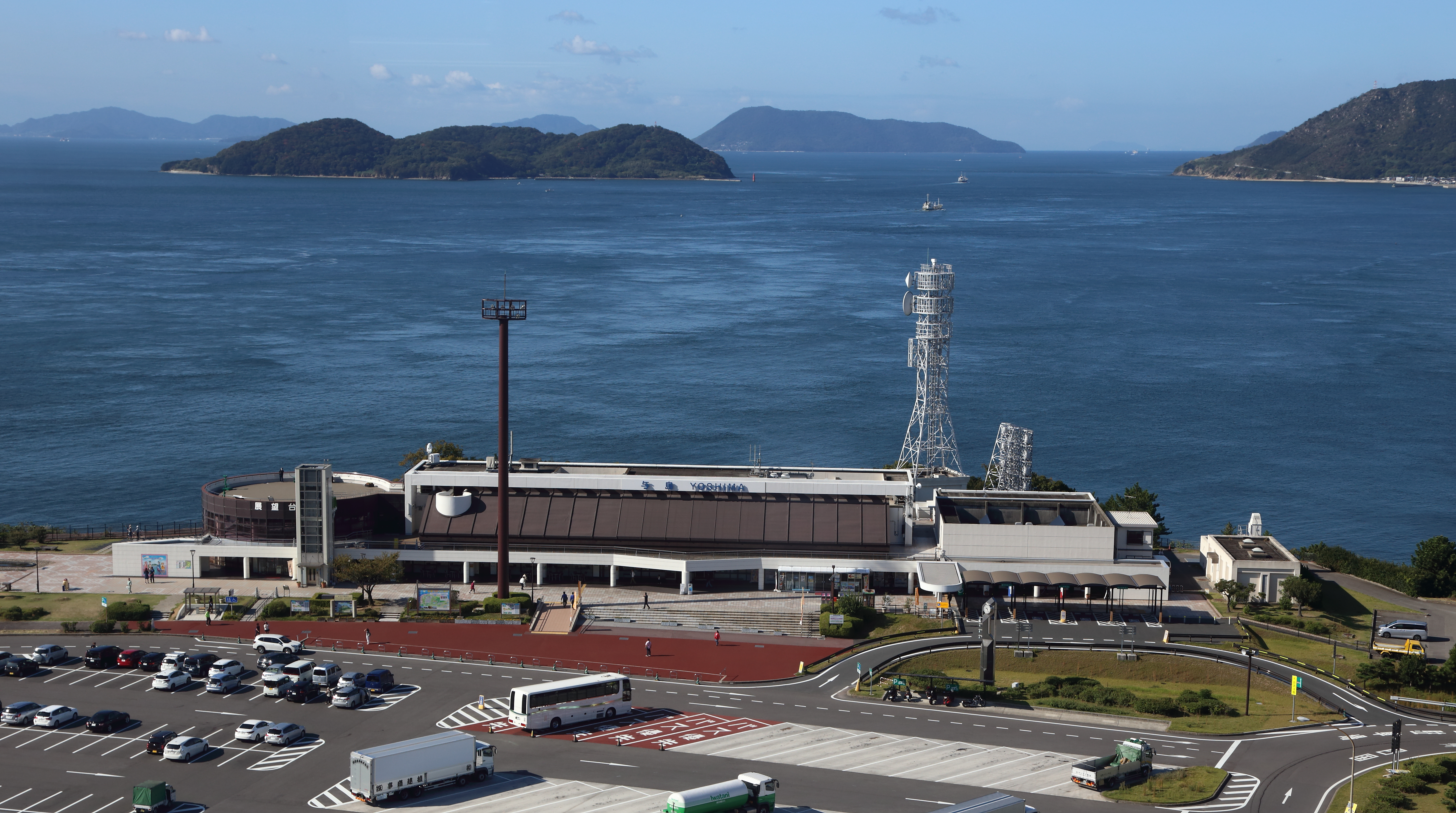 瀬戸中央自動車道 与島パーキングエリア 香川県坂出市与島町